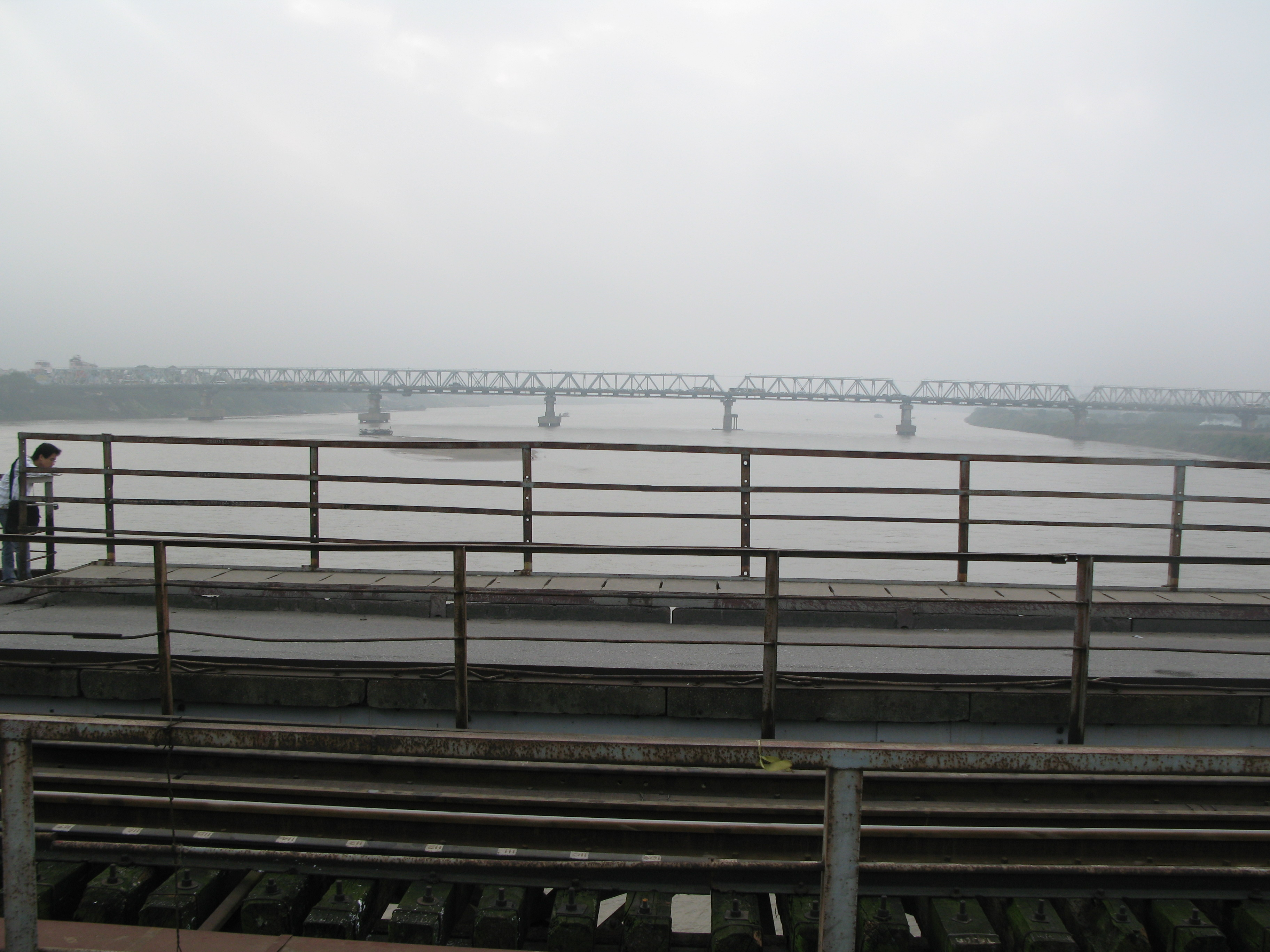 Từ trên cầu Long Biên nhìn dọc sông Hồng xuống cầu Chương Dương